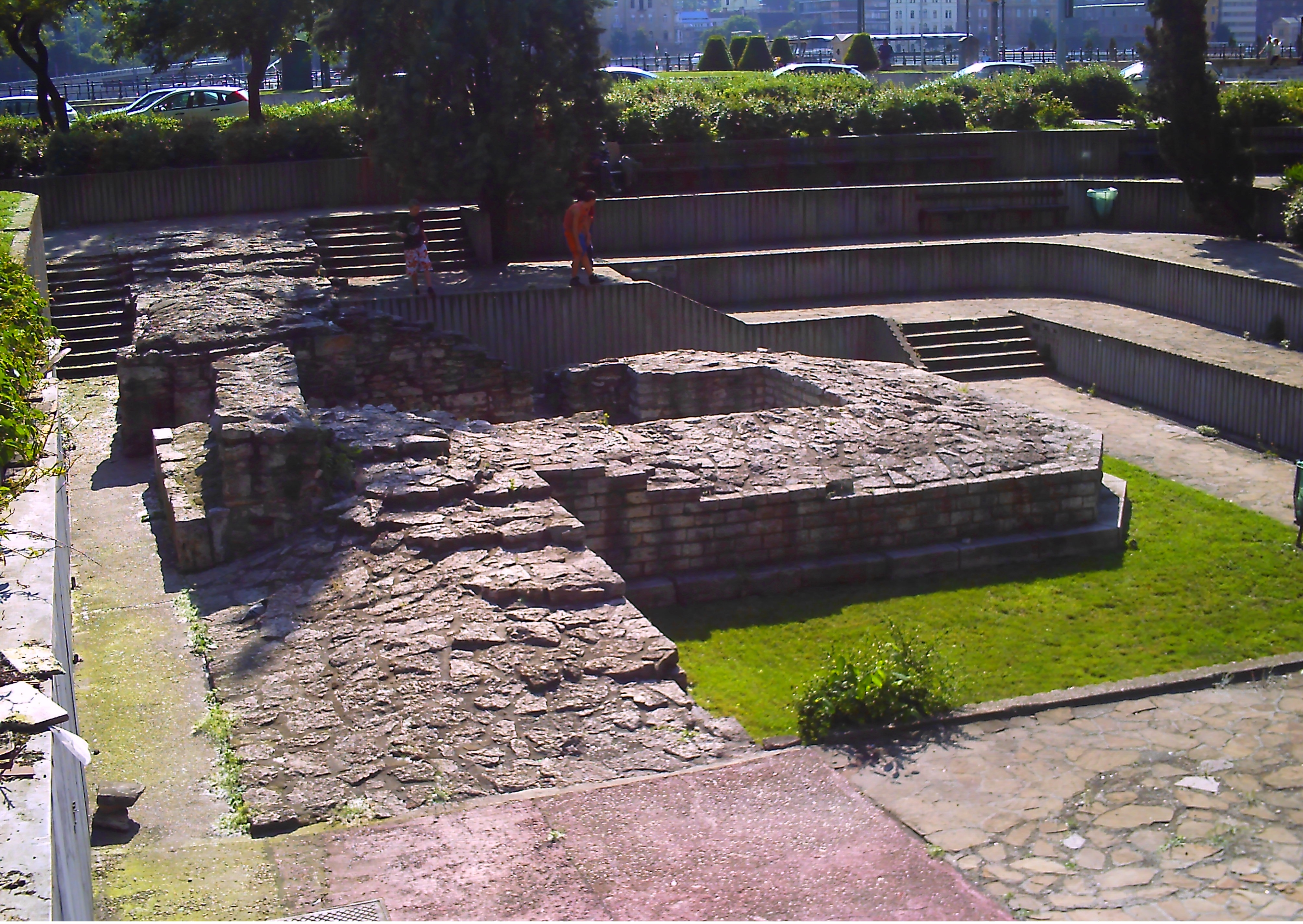 Contra-Aquincum romjai 2010 májusában, Budapest